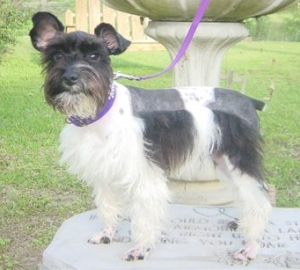 Parti Colored Miniature Schnauzer.